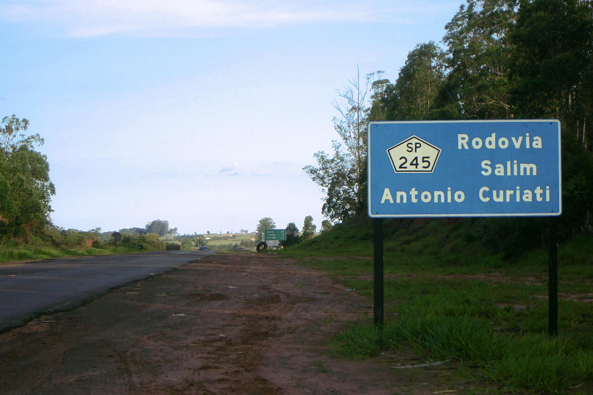 Rodovia SP-245, trevo de Cerqueira César em direção a Avaré, São Paulo, Brasil